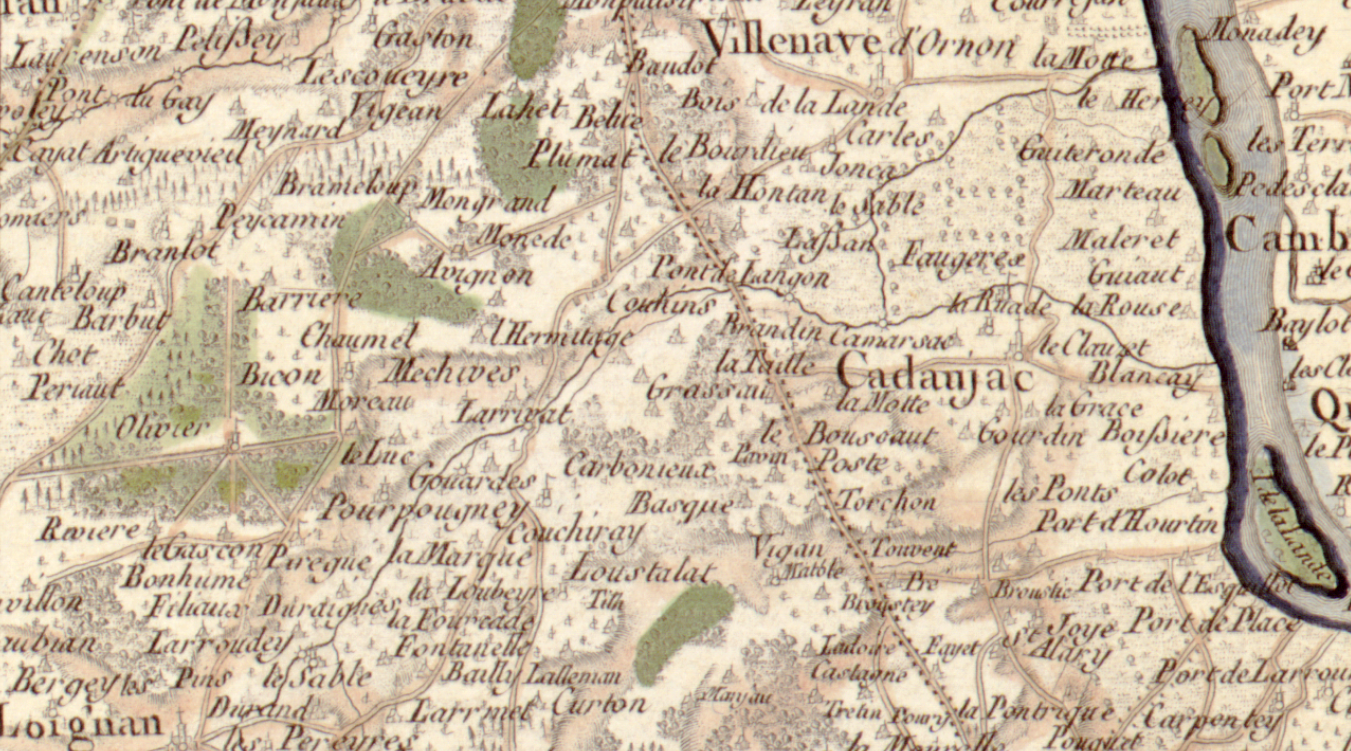 Carte de Cassini n°104 (Gironde, zoom sur Cadaujac), 1756.